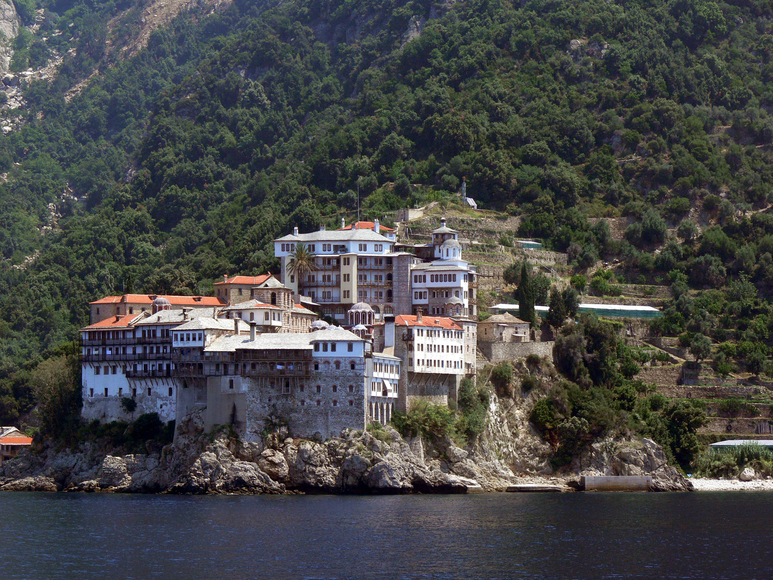 Kloster Grigoriou